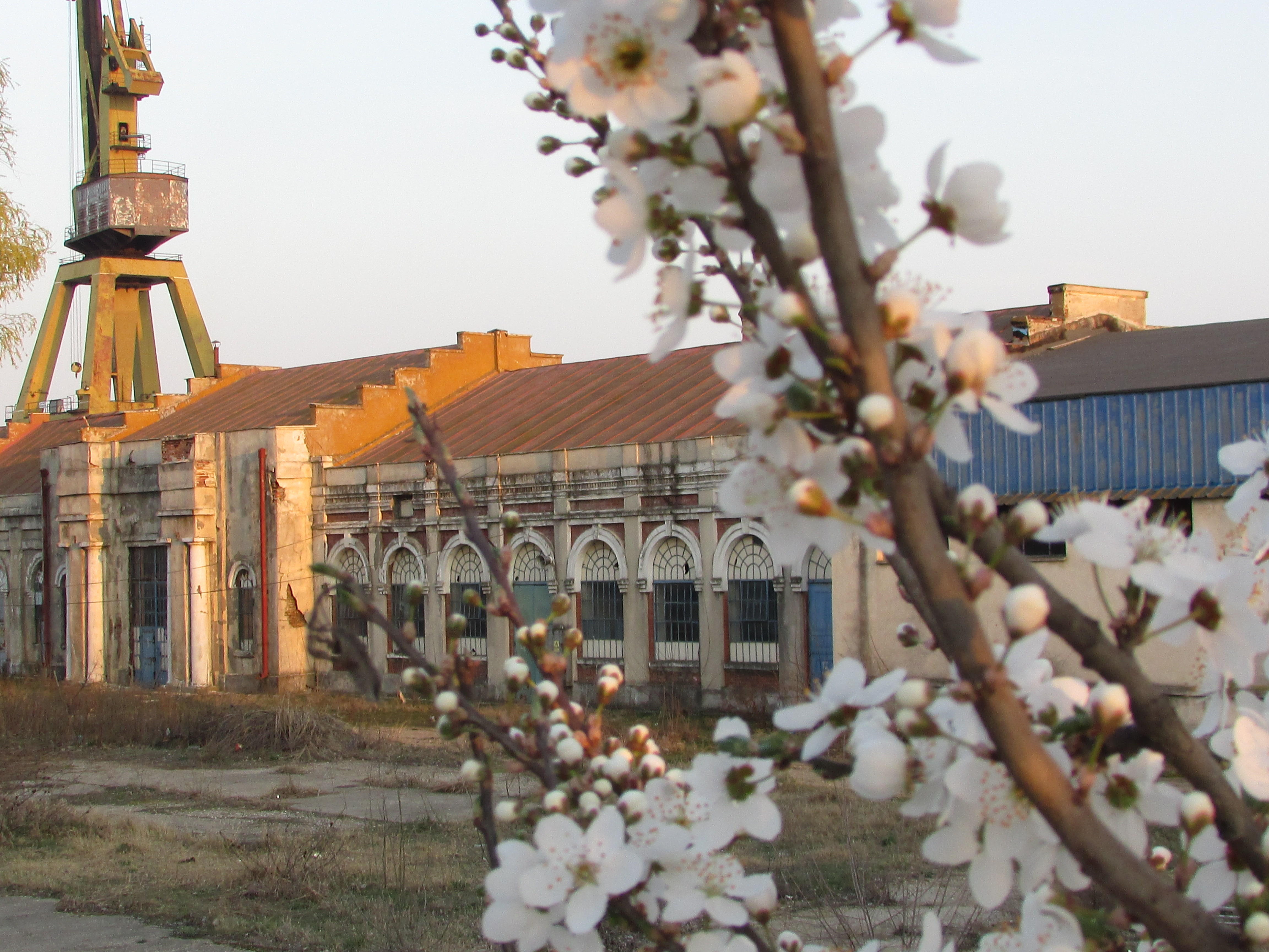 Atelierele vechi ala Șantierului Naval Giurgiu 01